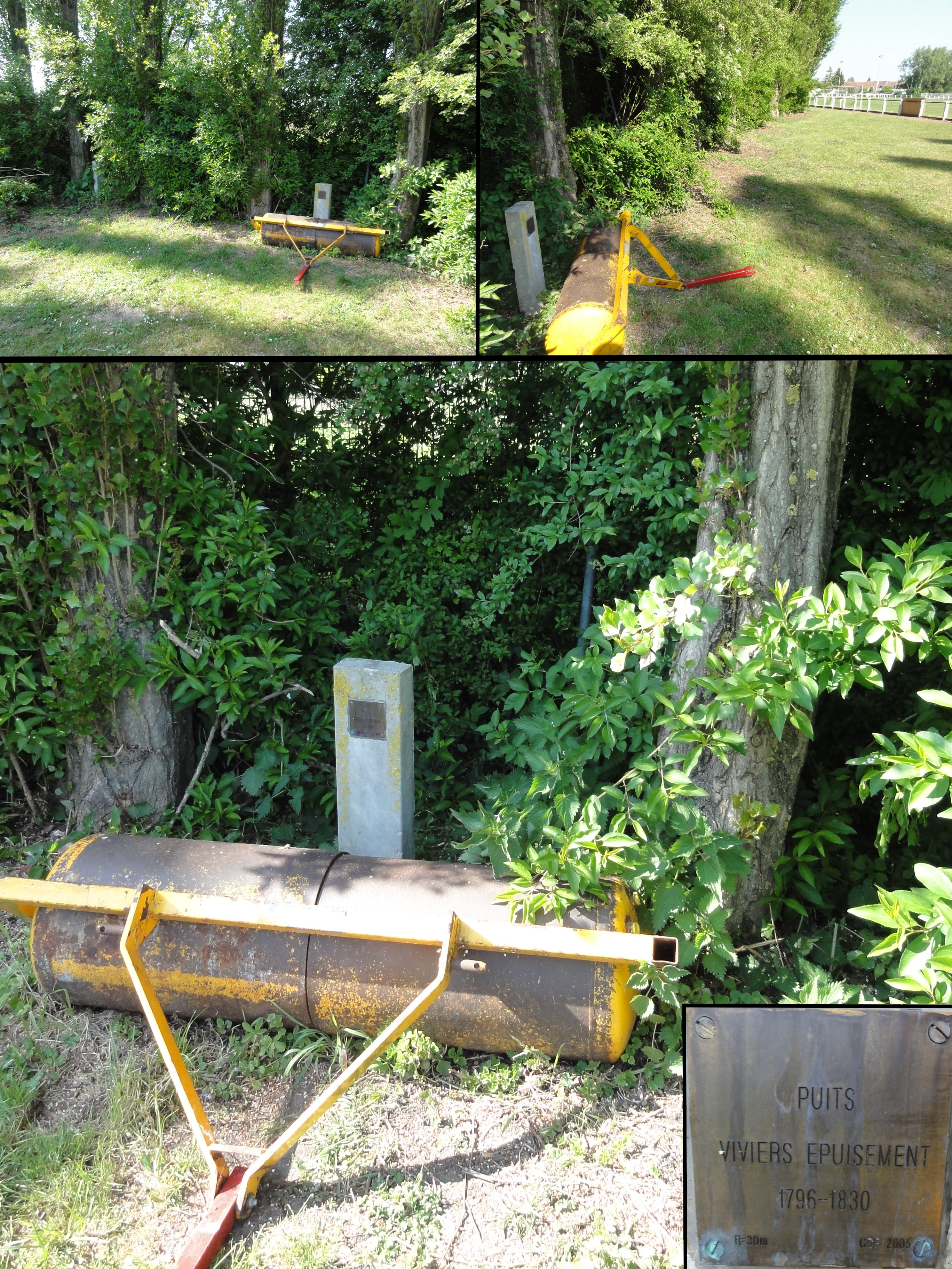 La Fosse Viviers de la Compagnie des mines d'Anzin était un charbonnage constitué de deux puits situé à Fresnes-sur-Escaut, Nord, Nord-Pas-de-Calais, France.